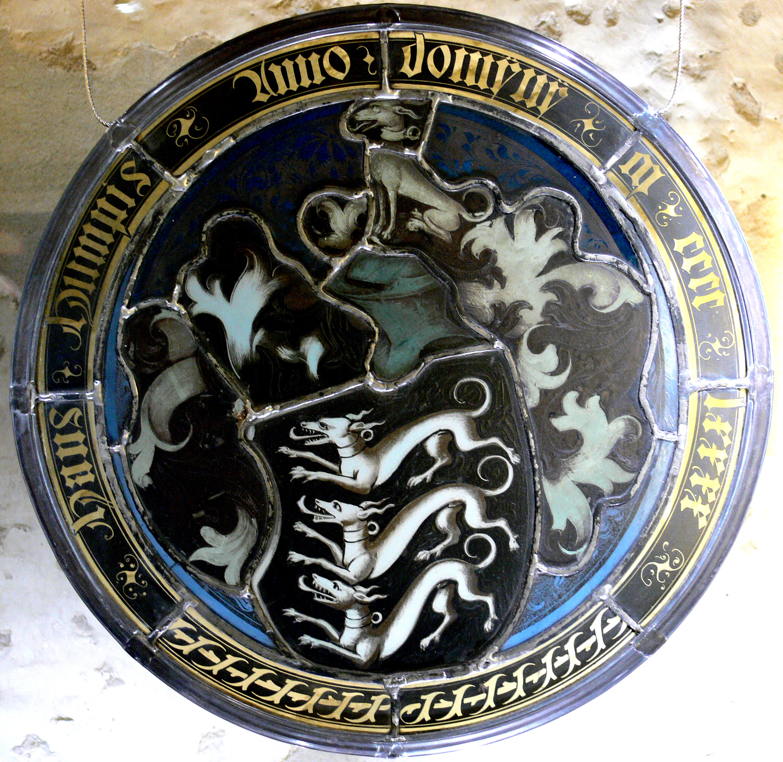 Museum Humpisquartier, Ravensburg Wappenscheibe des Hans Humpis, 1490, aus dem Kleinen Sitzungssaal des Ravensburger Rathauses Humpis-Quartier Native nameMuseum Humpis-QuartierLocationRavensburg, GermanyCoordinates47° 46′ 49.8″ N, 9° 36′ 57.24″ E Established2009Web page control : Q1637298 VIAF: 128828875 LCCN: nb2007020847 GND: 4565586-8 WorldCat